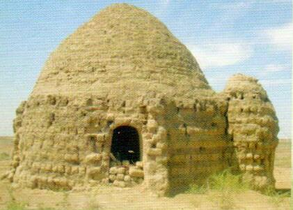 Қазақша (кирил): Жапақ мазары